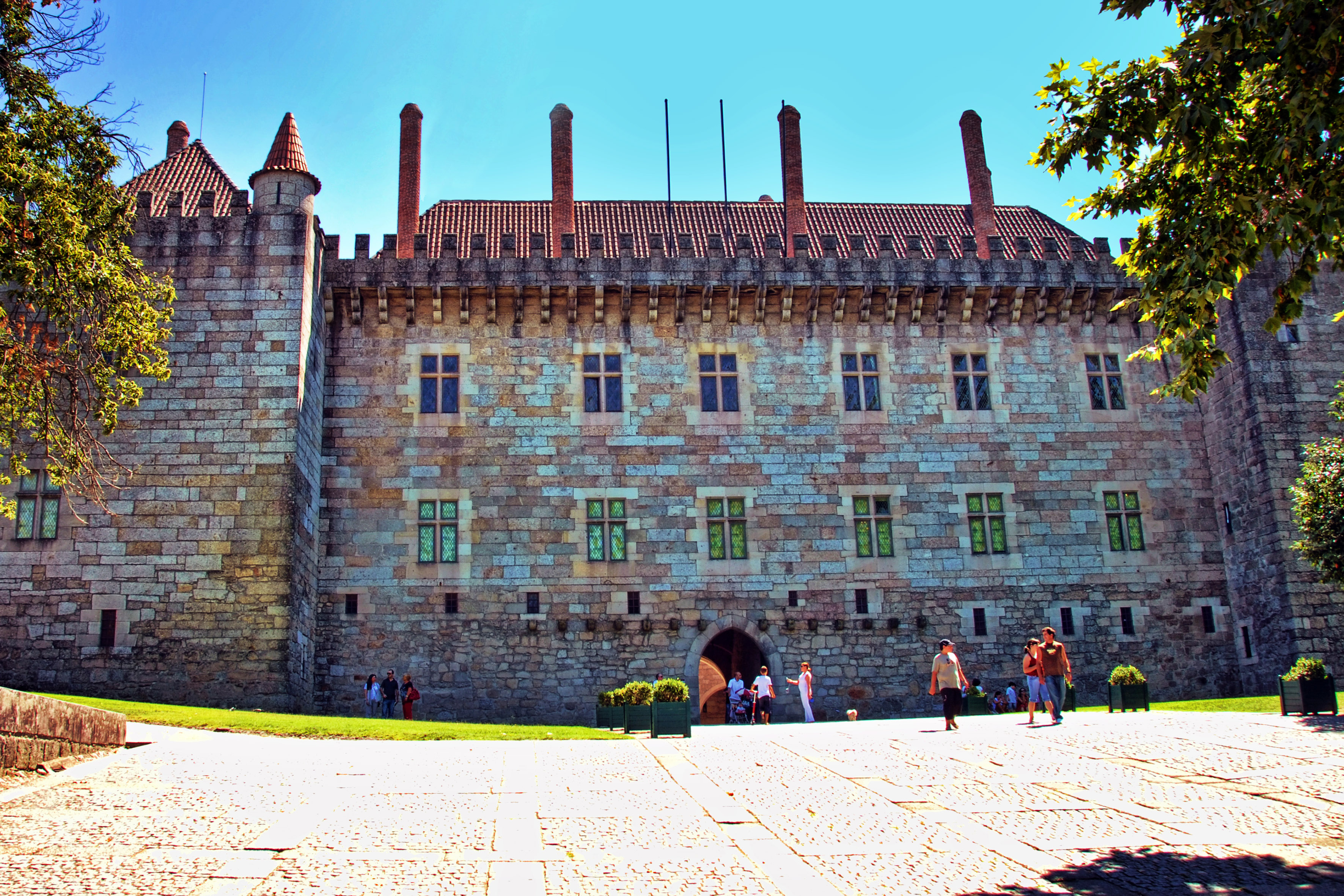 Guimarães - Paço dos Duques de Bragança This file was uploaded for Wiki Loves Monuments in Portugal with the unique identifier 70513.